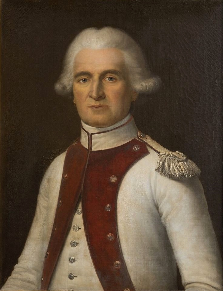 Portrait rétrospectif ommandé par Louis-Philippe pour le musée historique de Versailles en 1835